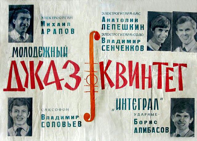 фотографии и афиши группы "Интеграл"